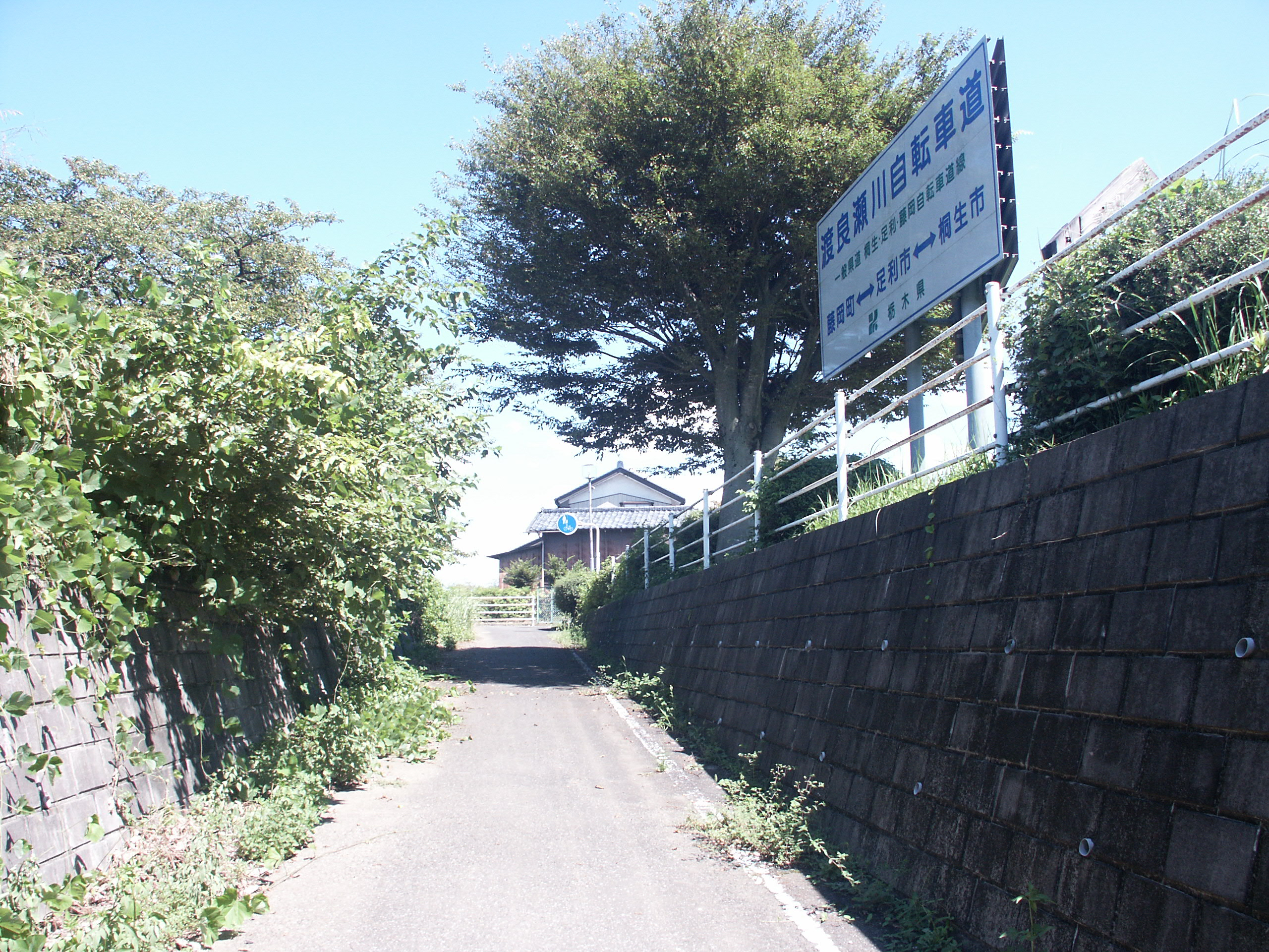 栃木県道402号線栃木市藤岡町藤岡付近（渡良瀬川自転車道休憩所下）